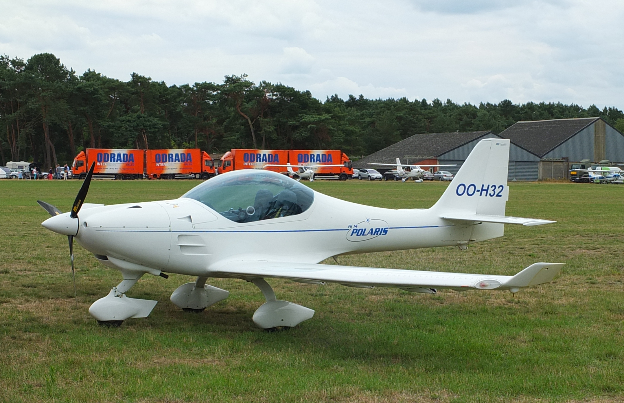 B&F Technik FK-14 polaris B OO-H32 (C/N: 014-046) op de Keiheuvel Fly In 2015.